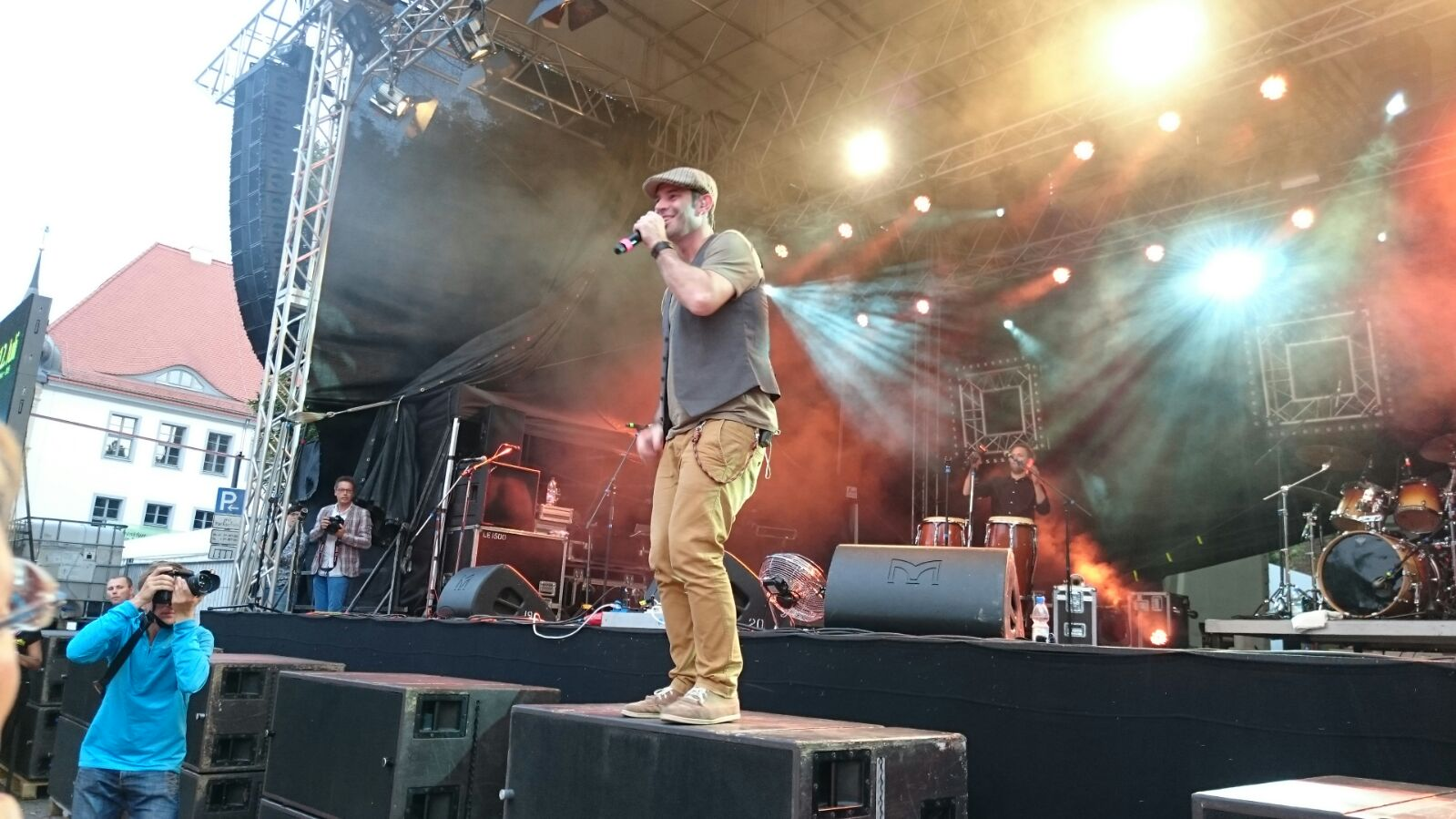 Marquess bein Stadtfest Bunter Hering in Frankfurt (Oder) 2015